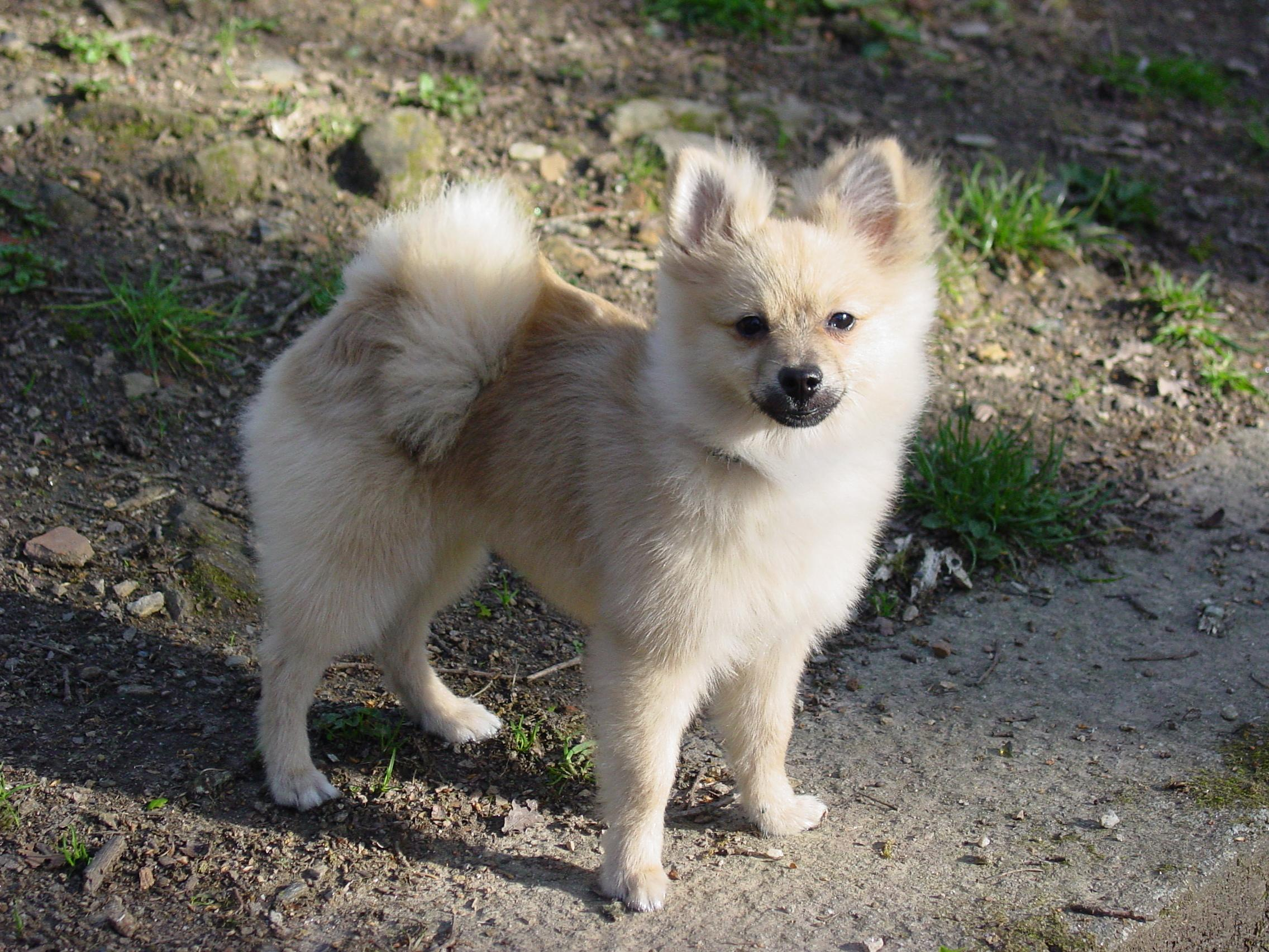 self made.